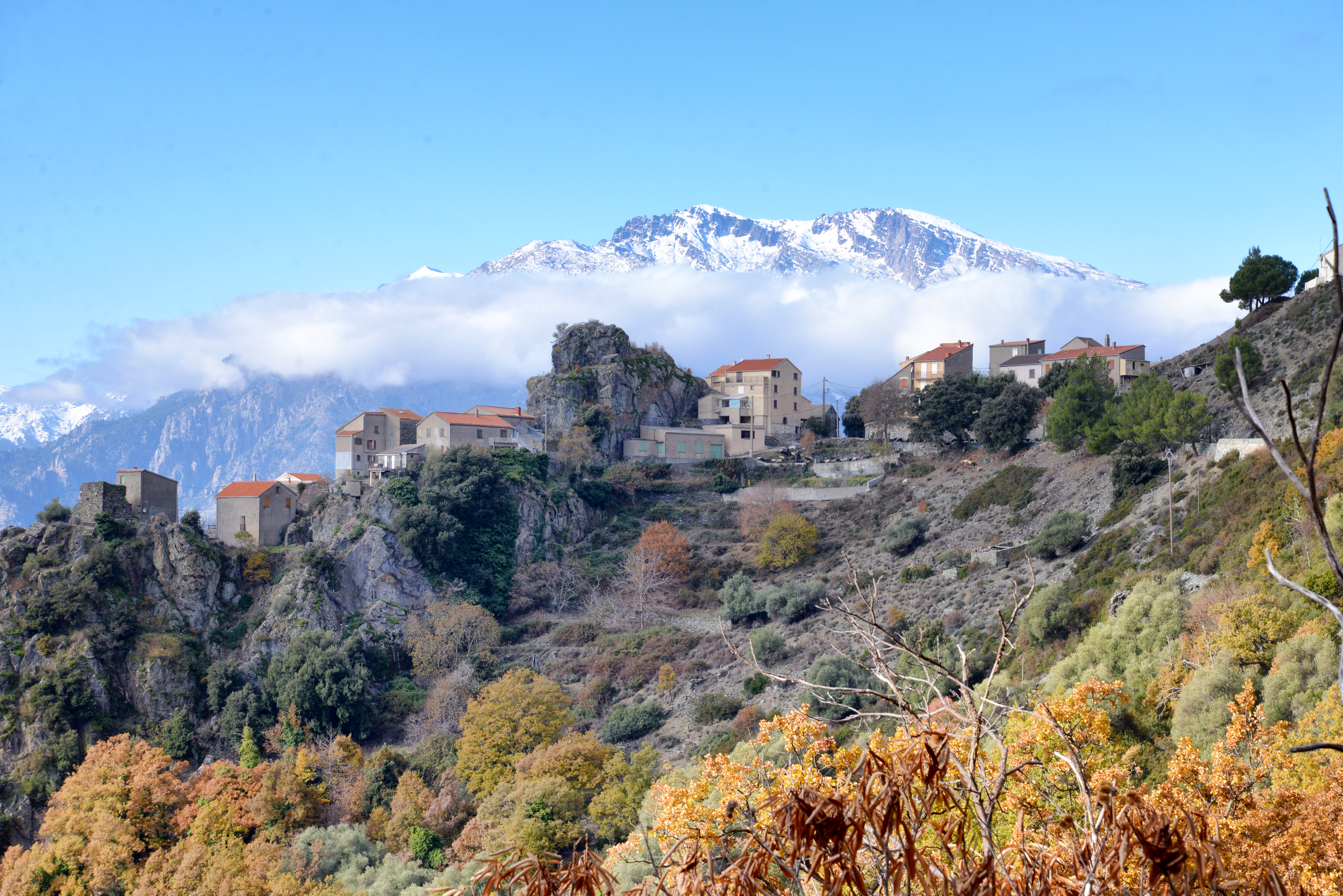 Altiani, Rogna (Corse) - Vue du village situé au sud de la Castagniccia. À l'arrière-plan, le massif du Monte Cardo